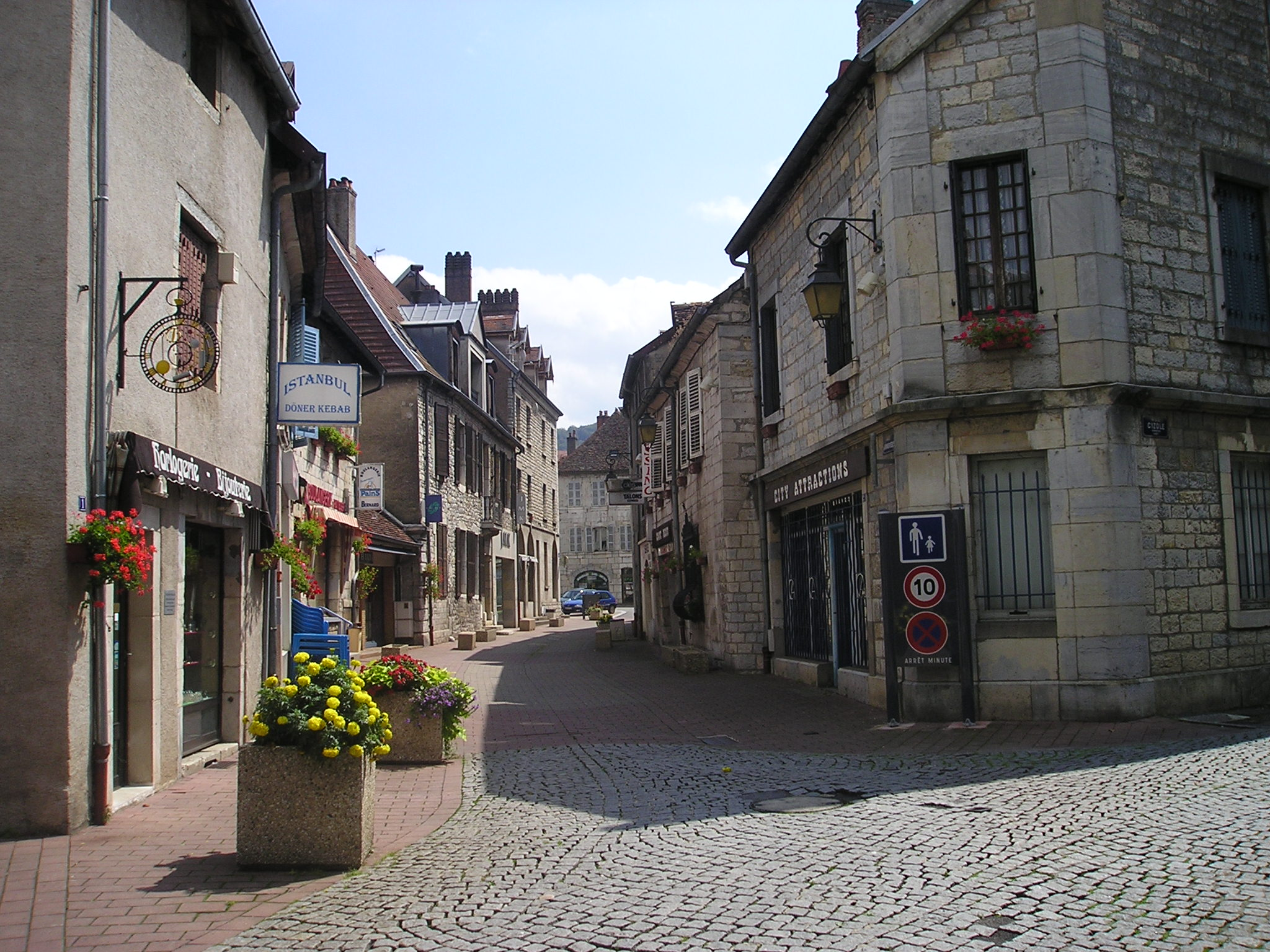 Baume-les-Dame, Straßenzug